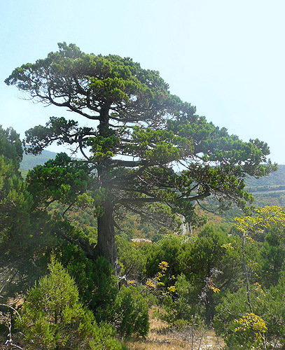 В можжевеловом редколесье. Южные склоны хребта Маркотх, окрестности Новороссийска